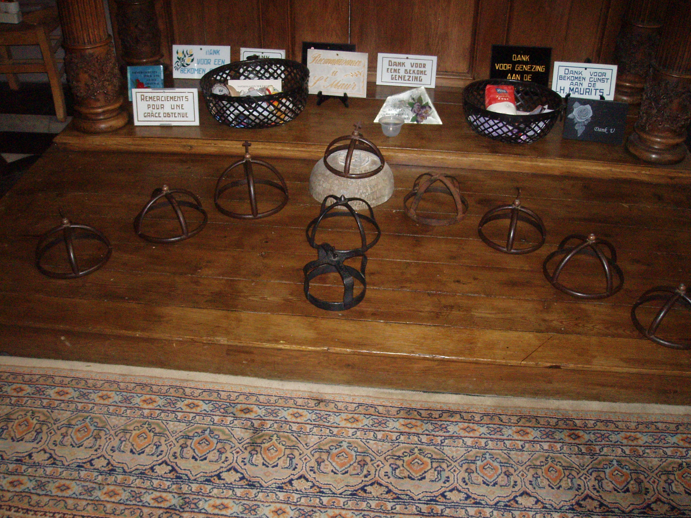 Onze-Lieve-Vrouw ten Steenkapel